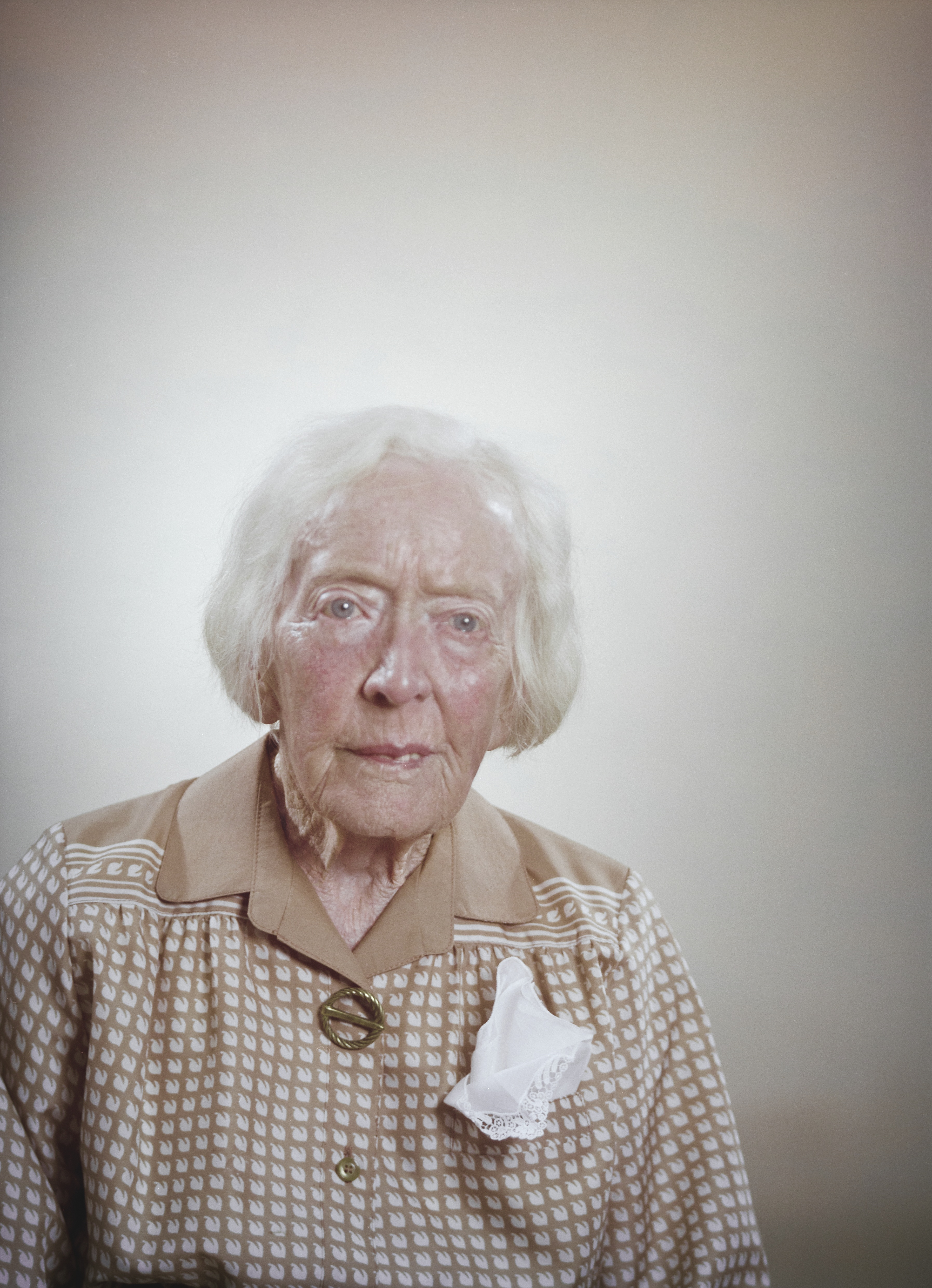 Kirjailija, suomentaja ja filosofian kunniatohtori Tyyni Tuulio (ent. Tallgren).